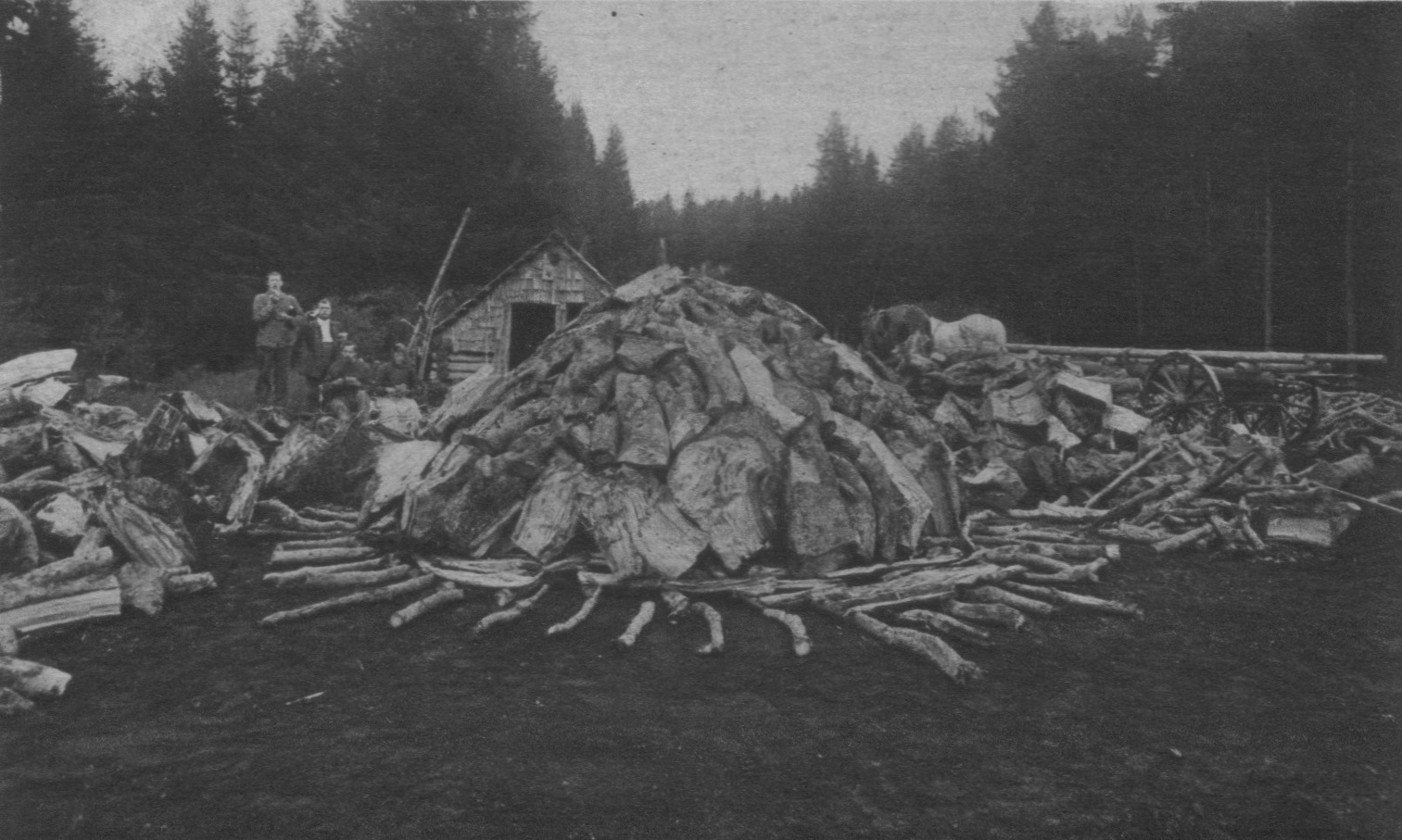 Die Brücke dient als Zug-Anlage. Das Holz wird schräg gegen die Mitte auf die Brücke gestellt.